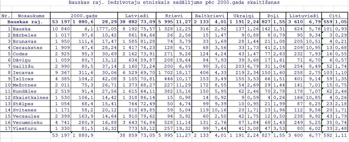 результаты переписи населения Латвии ни 01.04.2000